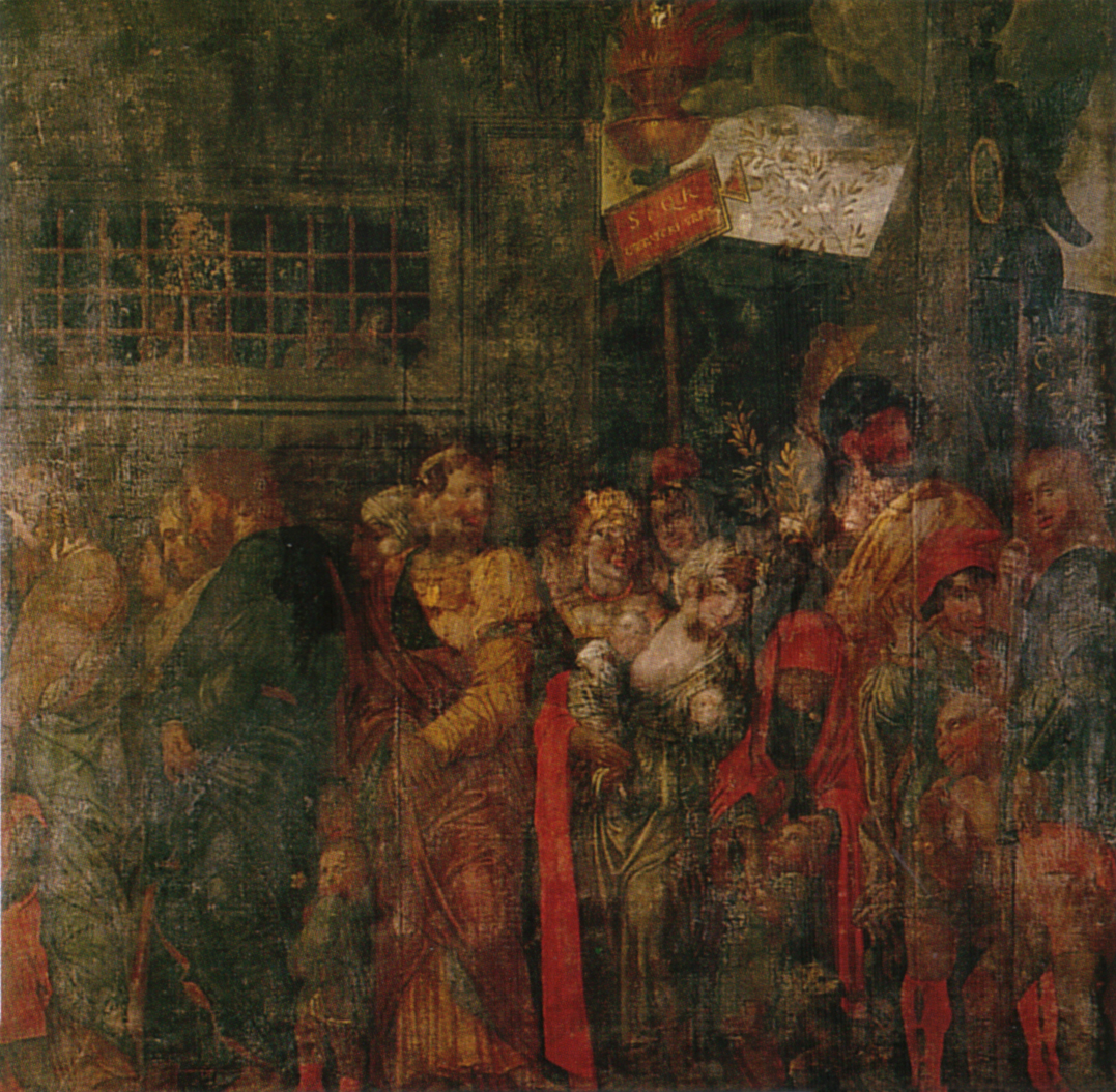 captives